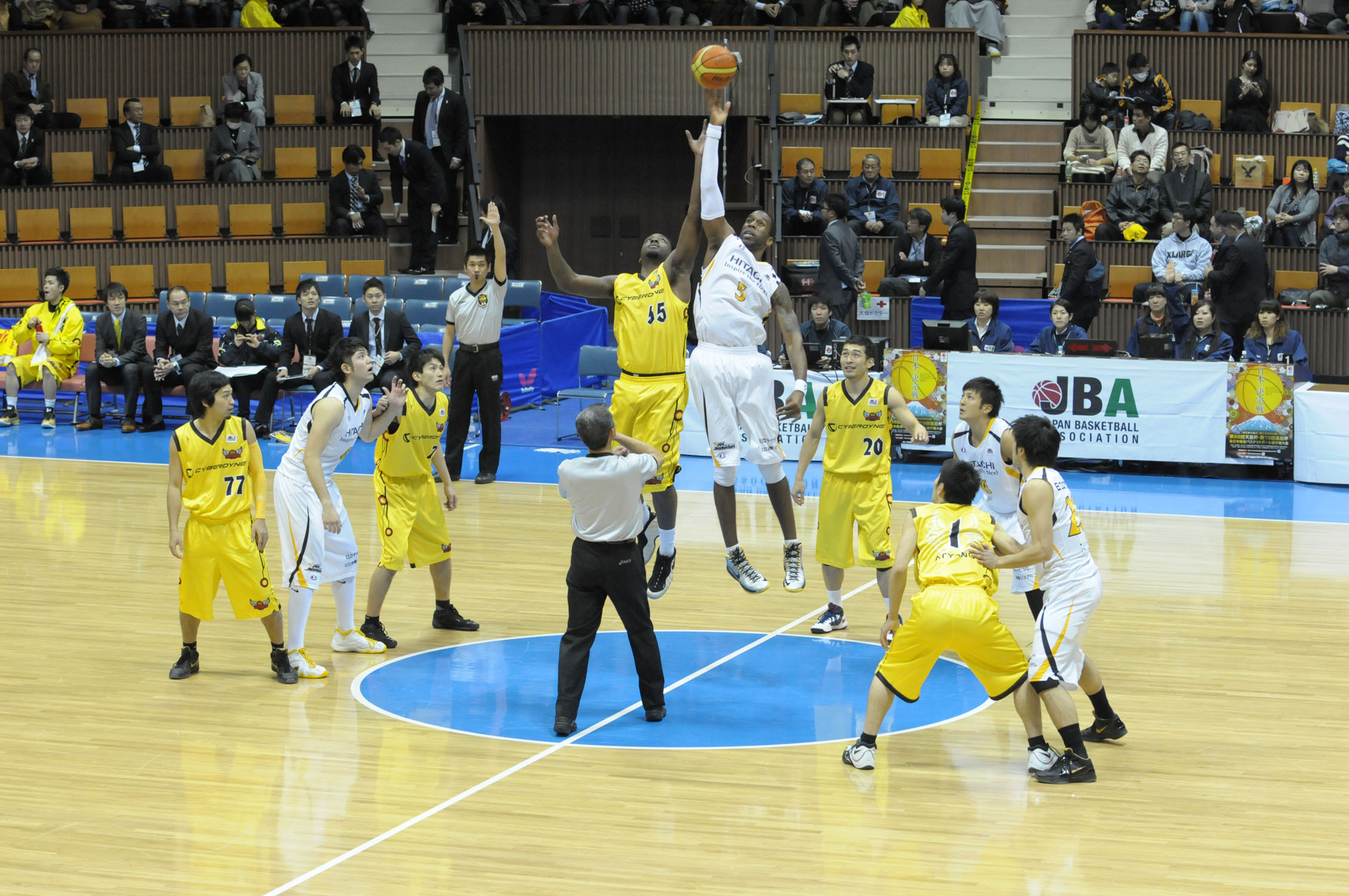 2013年全日本総合バスケットボール選手権大会3回戦、日立サンロッカーズ対デイトリックつくば。代々木第二体育館で。